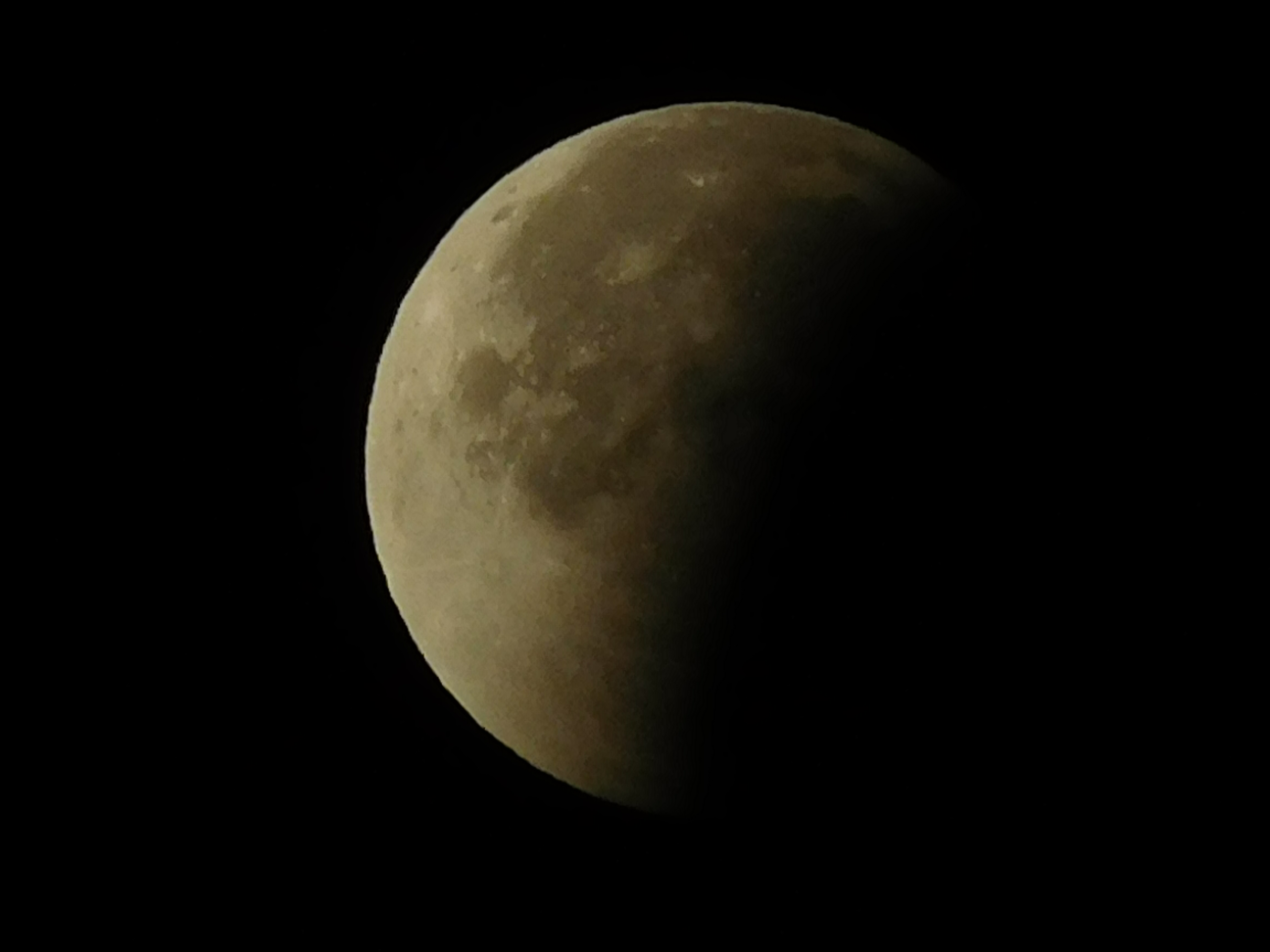 Éclipse lunaire du 28 septembre 2015 vue à 4:02 UTC depuis Cosne-Cours-sur-Loire, Nièvre, France.